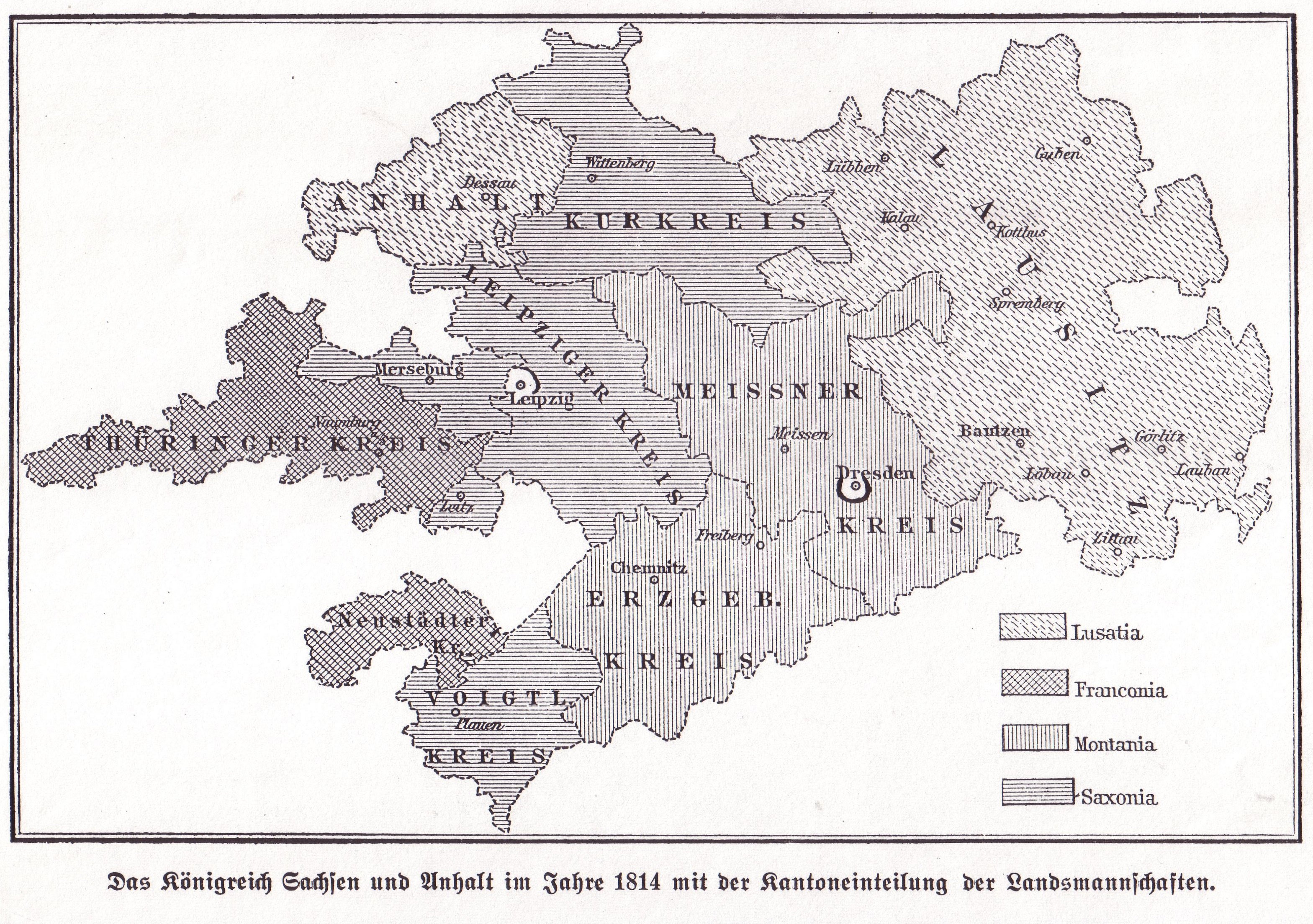 Karte der Kantoneinteilung für die historischen Landsmannschaften im Königreich Sachsen.